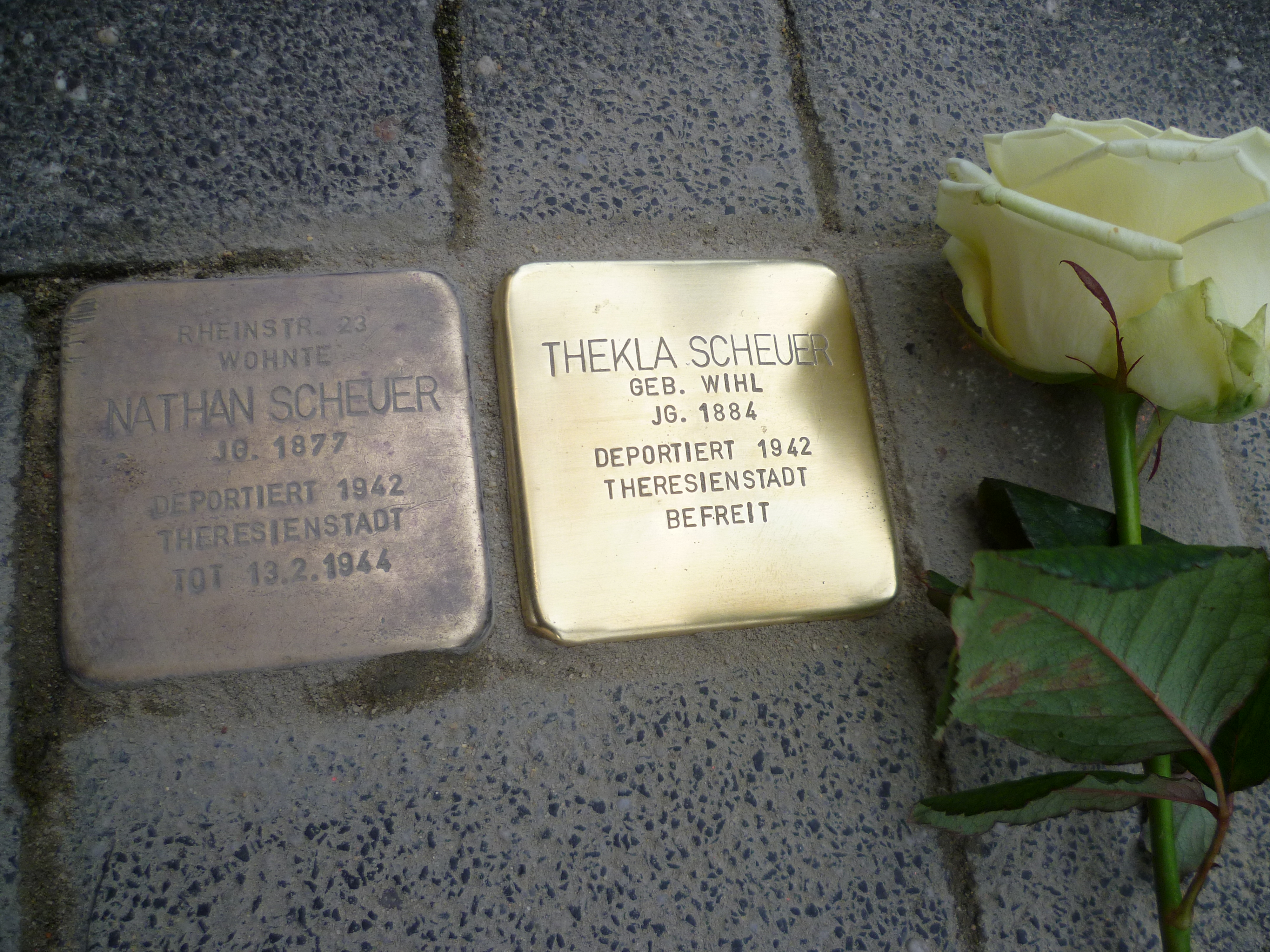 Rheinaustraße 127 Scheuer Nathan und Thekla 2018